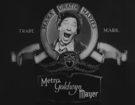 Imatges extretes del Tràiler de la pel·lícula Una nit a l'òpera dels Germans Marx.